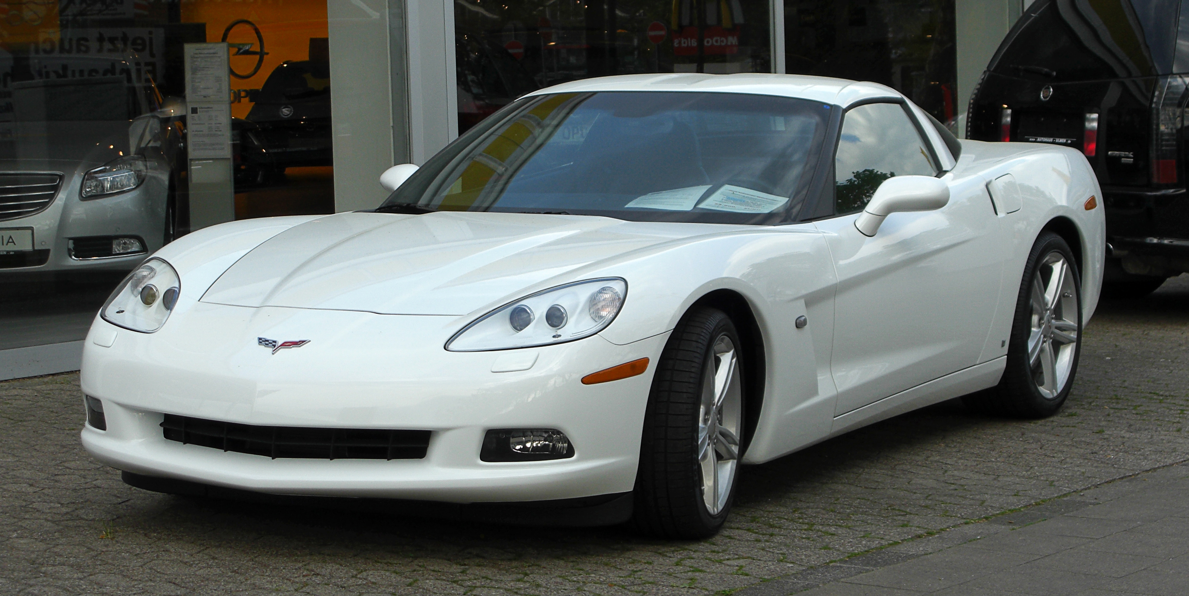 Chevrolet Corvette Coupé Luxury (C6)